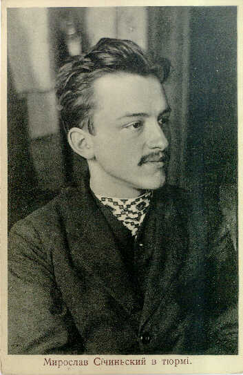 Мирослав Сичинский в тюрьме, 1909